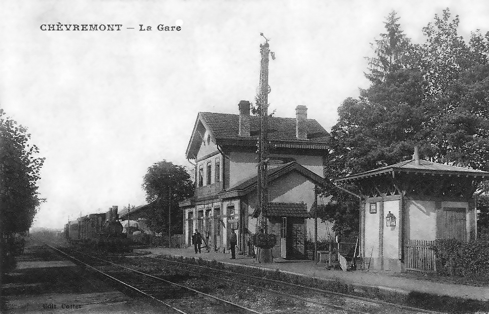 La gare de Chèvremont au début des années 1900.